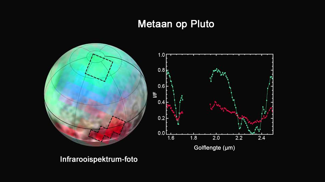 Metaan op Pluto